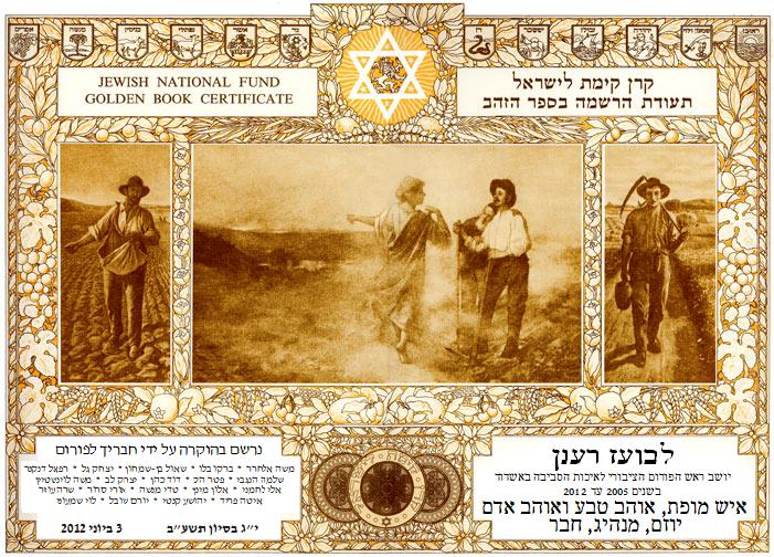 קרן קימת לישראל, תעודת הרשמה בספר הזהב